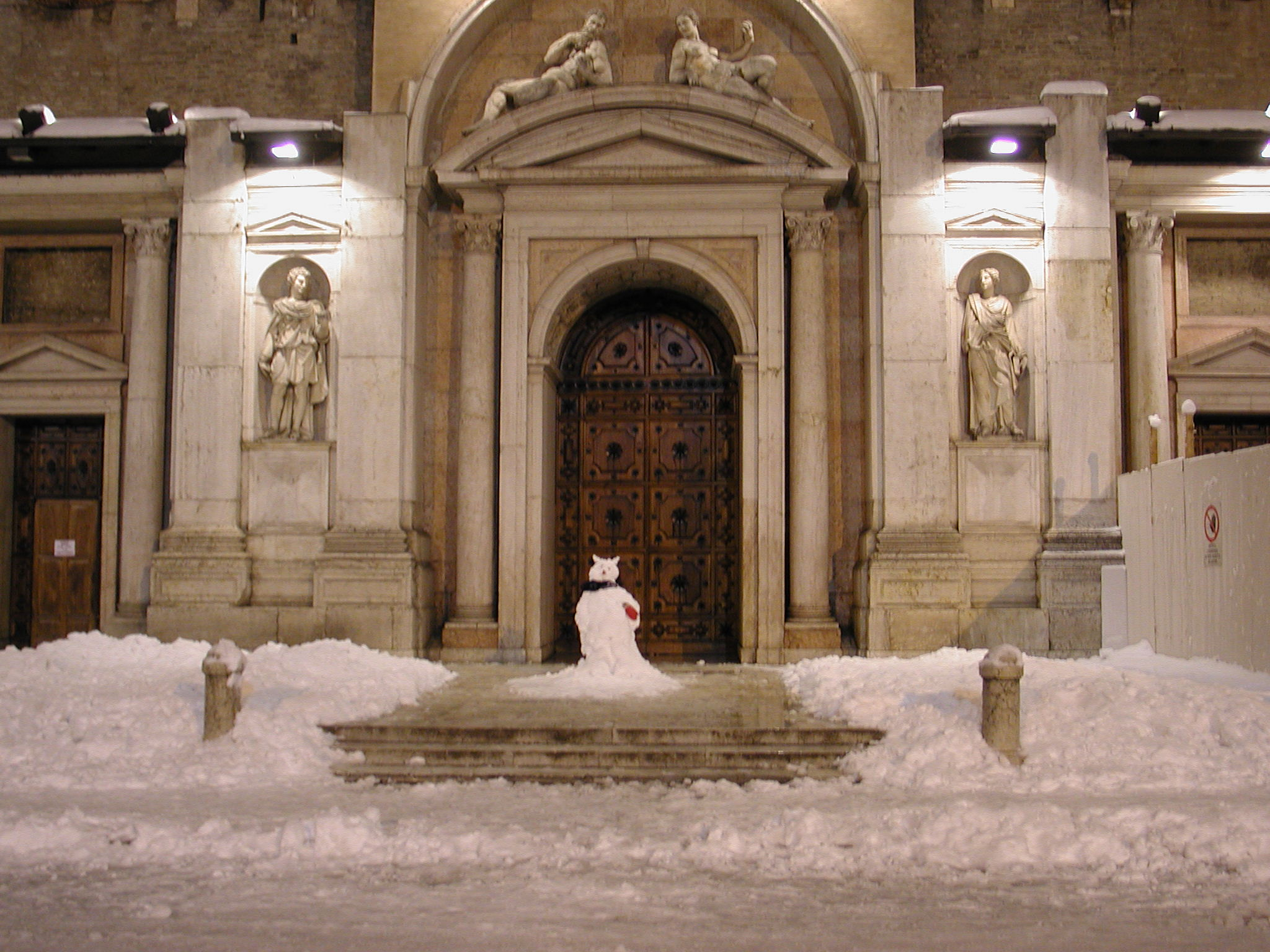 Reggio Emilia, italy, pupazzo di neve davanti al duomo Paolo da Reggio